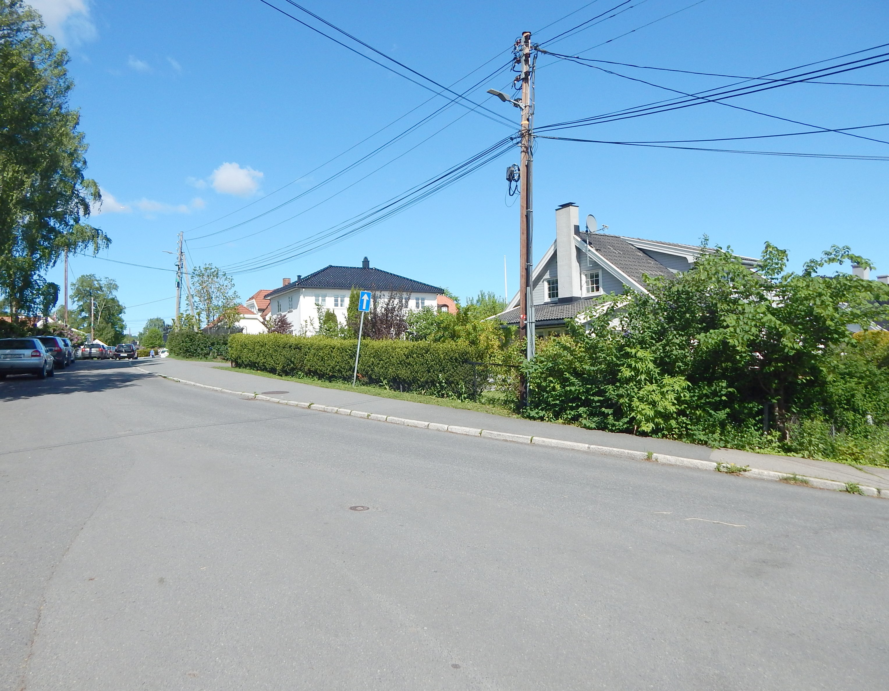 Borgenveien